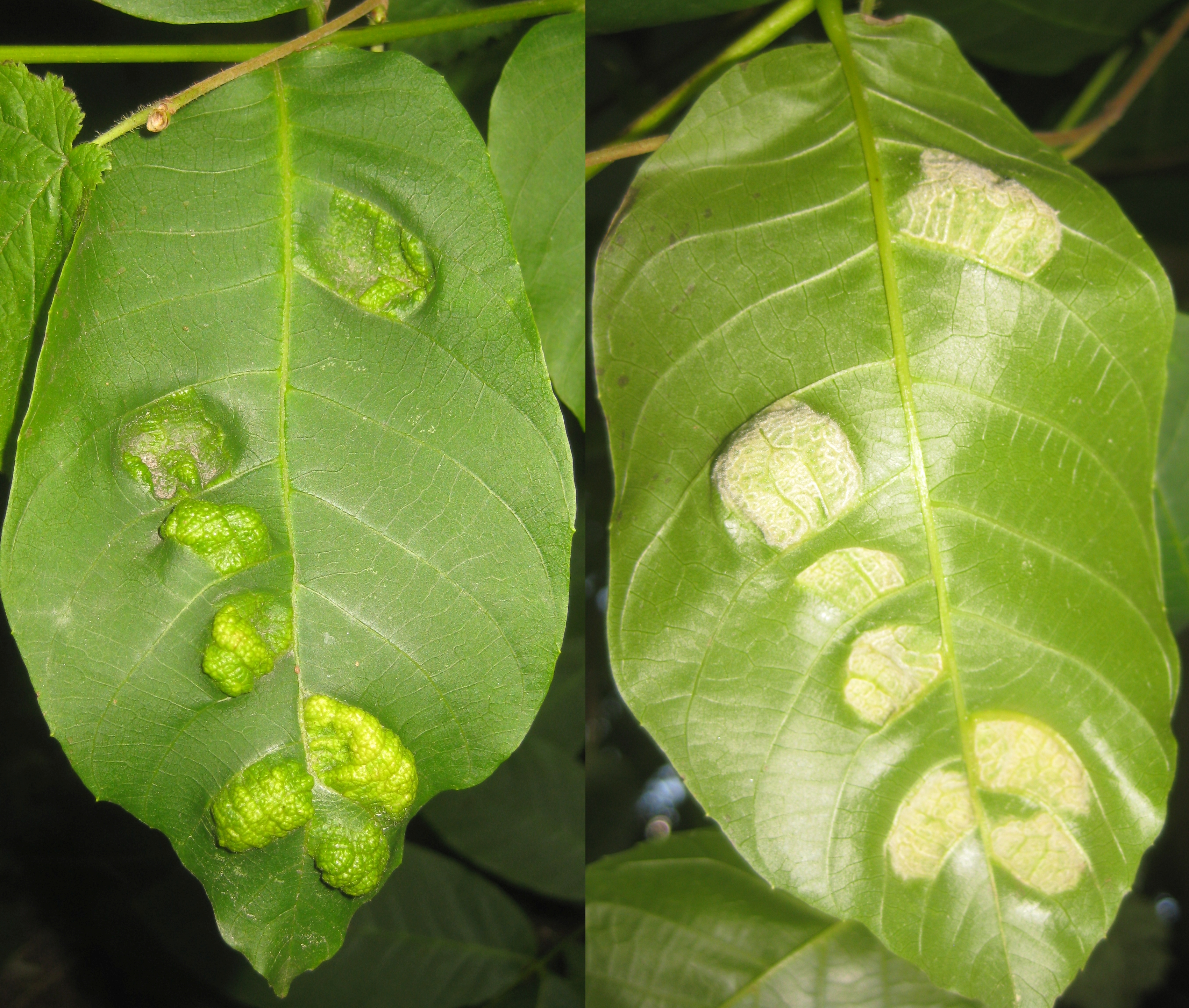 Ruhland, Wohnhof Ortrander Straße 14, Waldrand hinter Neugrabenweg 1a, Filzgallen an Walnuss-Blatt, Ober- und Unterseite, Frühling; verursacht von Walnuss-Filzgallmilbe (Aceria erinea)